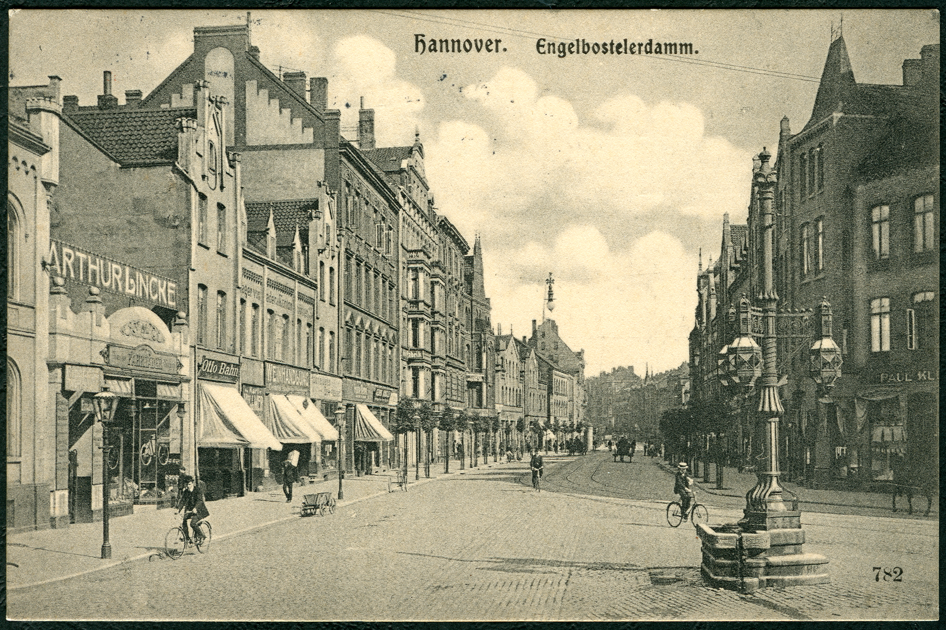 Blick von der Straße An der Christuskirche in den Engelbosteler Damm, auf dieser Karte noch Engelbostelerdamm geschrieben. Der "E-Damm", die erste in Hannover asphaltierte Straße, ist hier noch mit Kopfsteinpflaster befestigt, durch die jedoch schon Straßenbahnschienen führen. Außer Kutschen, Fahrrädern und Handkarren sind jedoch keine weiteren (Auto-)Mobile zu sehen. Auf der linken Seite verkauft Arthur Lincke Fahrräder, dahinter bietet sich Otto Bahn an, gefolgt von der Weinhandlung Karl Vollmer. Weiter hinten ist der (heutige) "E-Damm 18 zu sehen, eines der wenigen Häuser, die die Luftangriffe auf Hannover im Zweiten Weltkrieg überstanden haben und in dessen Hinterhaus der Künstler Jorge La Guardia sein Atelier betreibt. Am rechten Bildrand ist das ehemalige Gebäude zu sehen, vor denen unter der heutigen Adresse Engelbosteler Damm 2A drei Stolpersteine verlegt sind. In der Bildmitte findet sich eine alte Pferdetränke ...